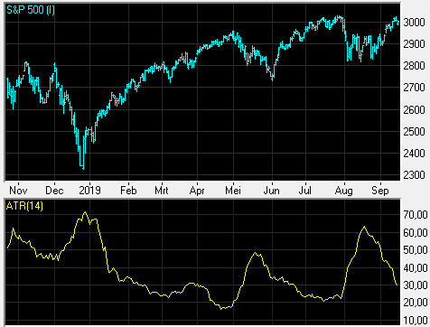 Average true range indicator berekend over 14 dagen